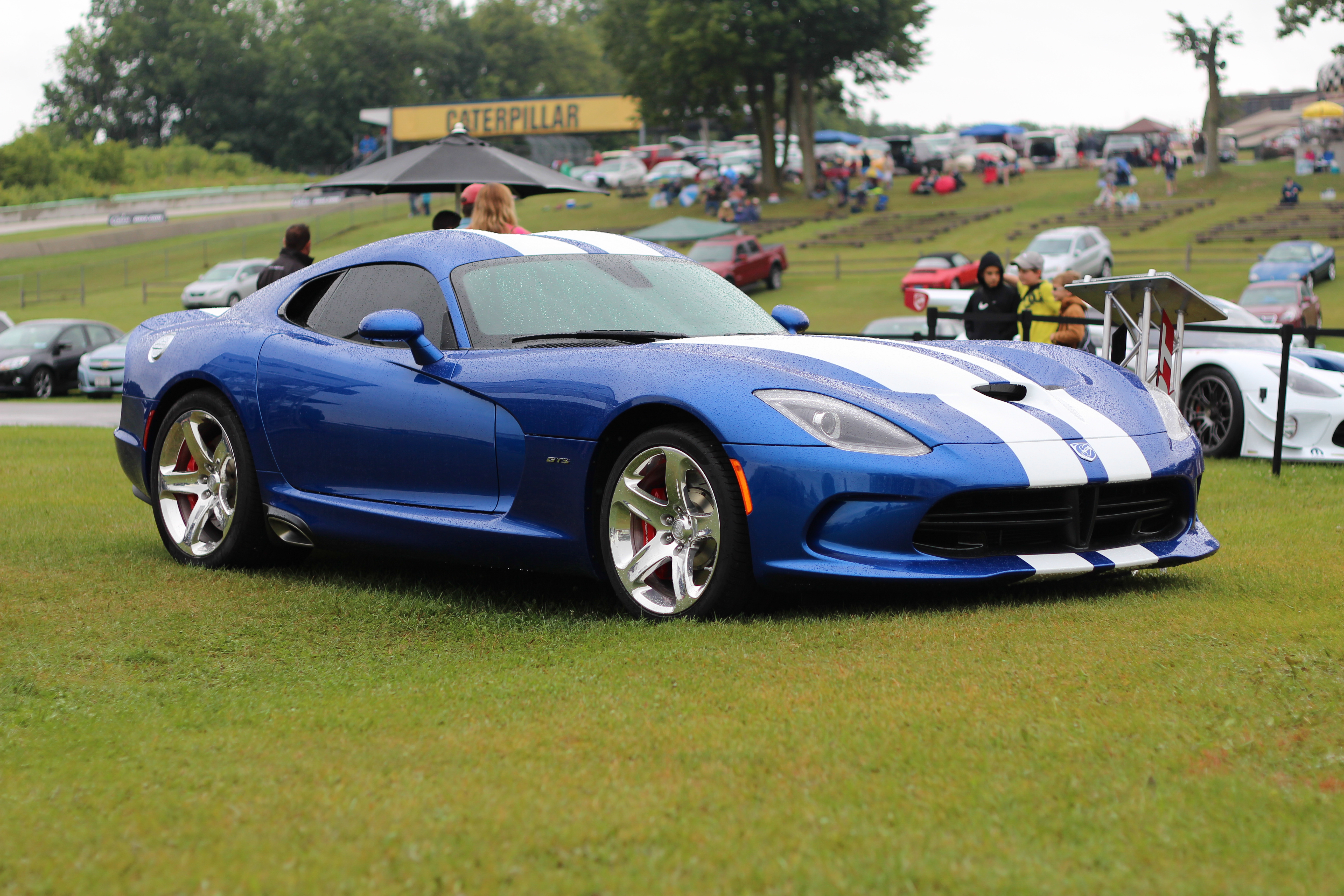 Una SRT Viper GTS in classica livrea blu bande bianche